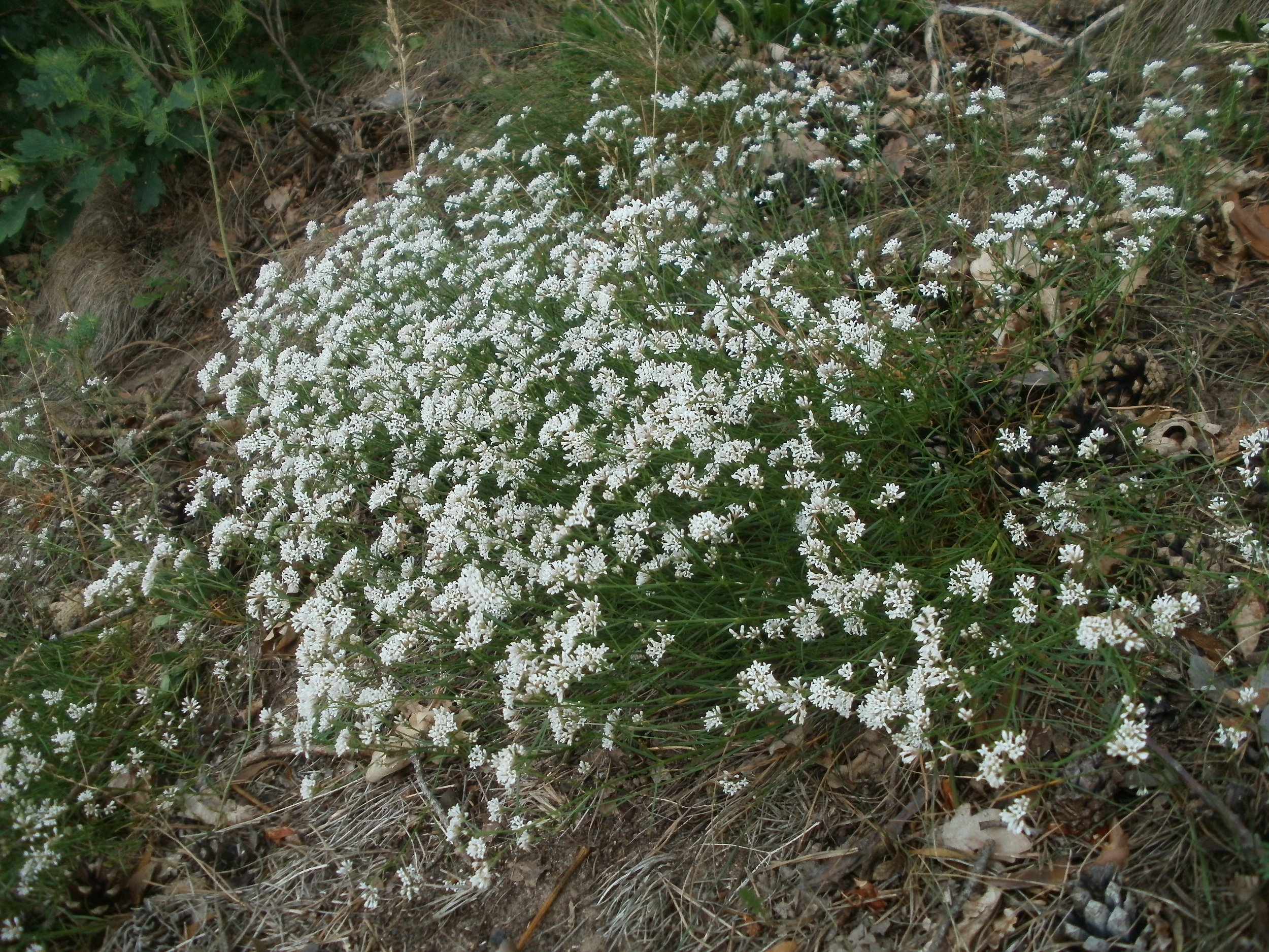 Hügelmeier (Asperula cynanchica) auf dem Dreieichenbuckel (Oftersheimer Dünen)